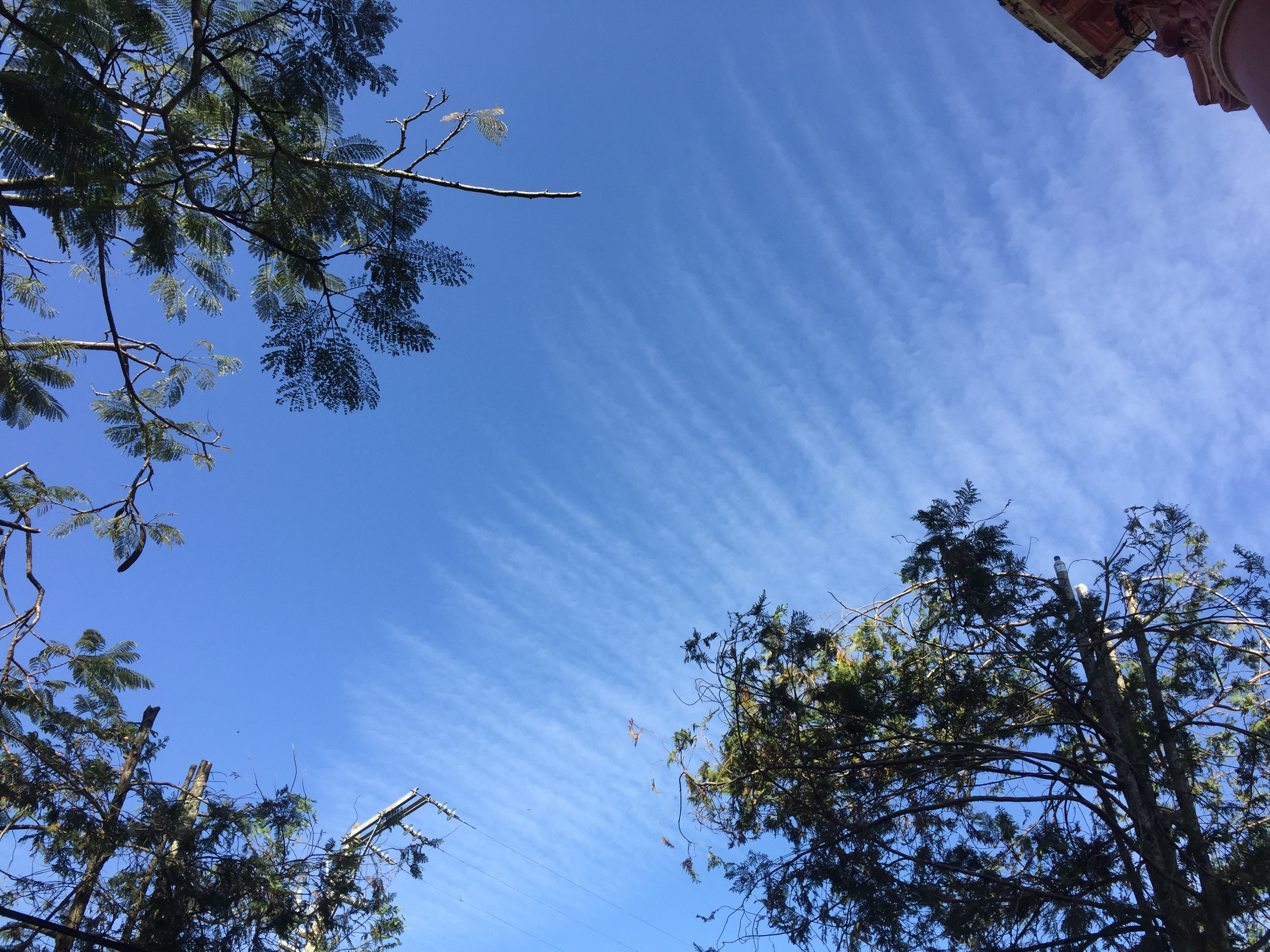 Cielo con nubes raras